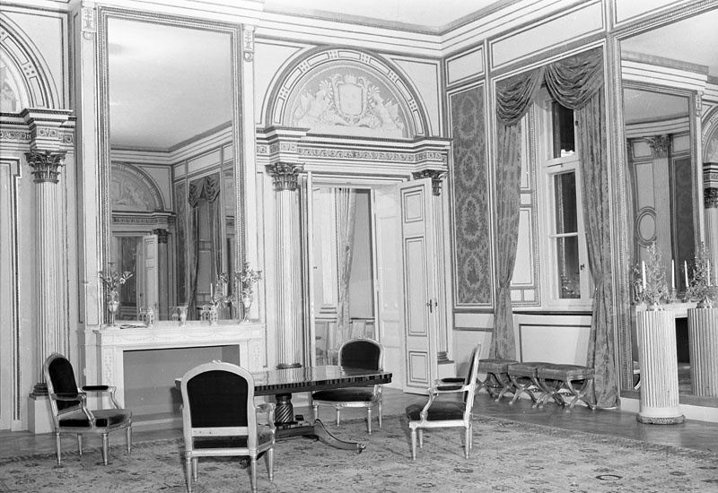 Gustav Adolfs Torg 1, Utrikesdepartementets nya lokaler (Arvfurstens palats). Röda salongen, interiör